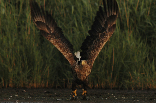 Orzeł bielik